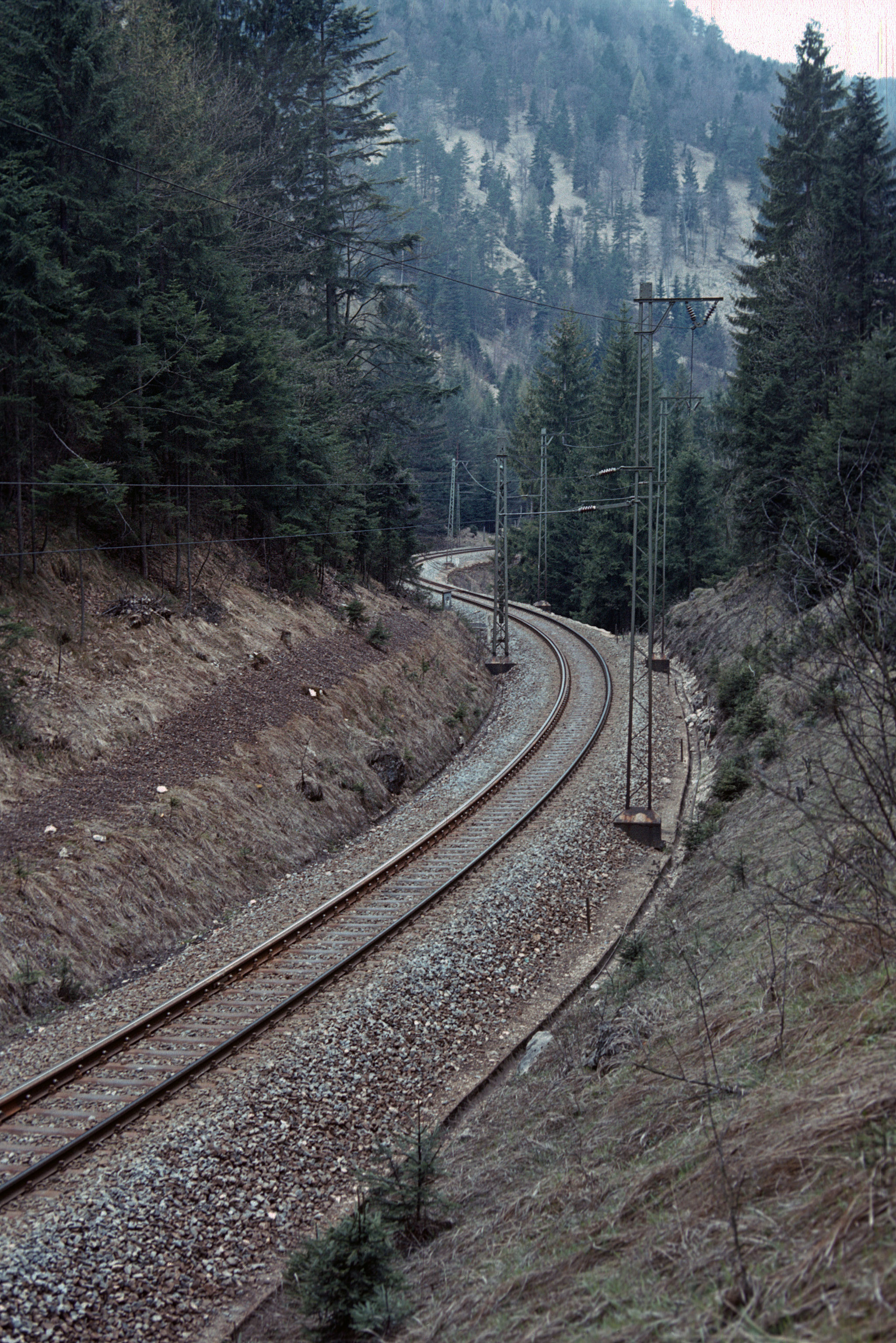 Streckenabschnitt Bayrisch Gmain - Hallthurm der Bahnlinie Freilassing - Berchtesgaden. Interessant ist nicht nur die Zwangsschiene auf der jeweiligen Bogeninnenseite, sondern auch die sogenannte "windschiefe" Fahrleitung, die gerne bei engen, kurvenreichen Strecken verwendet wurde.